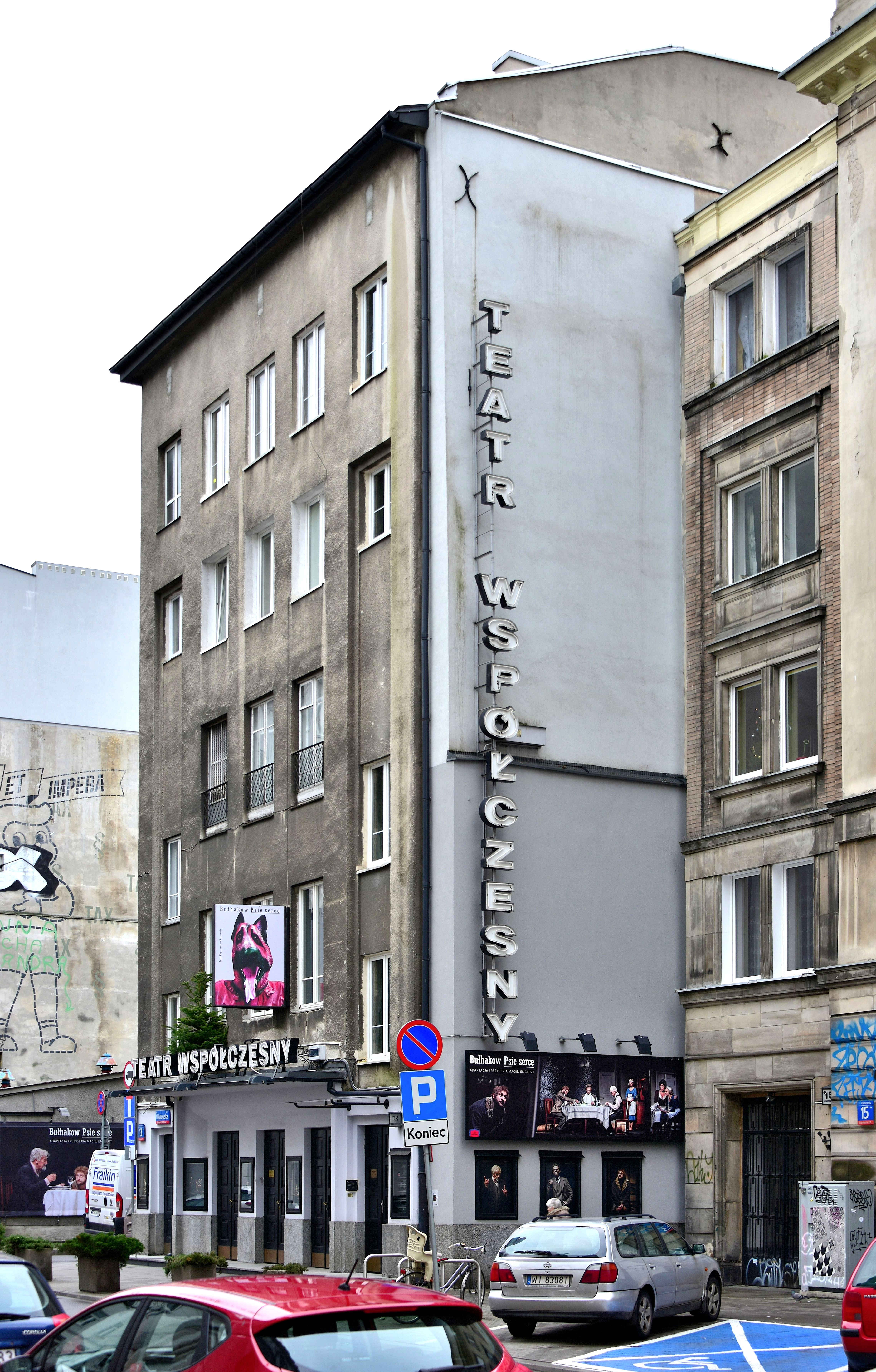 Teatr Współczesny w Warszawie